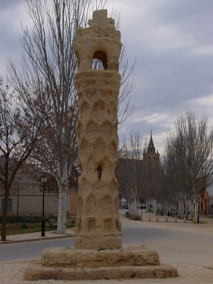 Picota o rollo de Justicia de Villanueva de la Jara